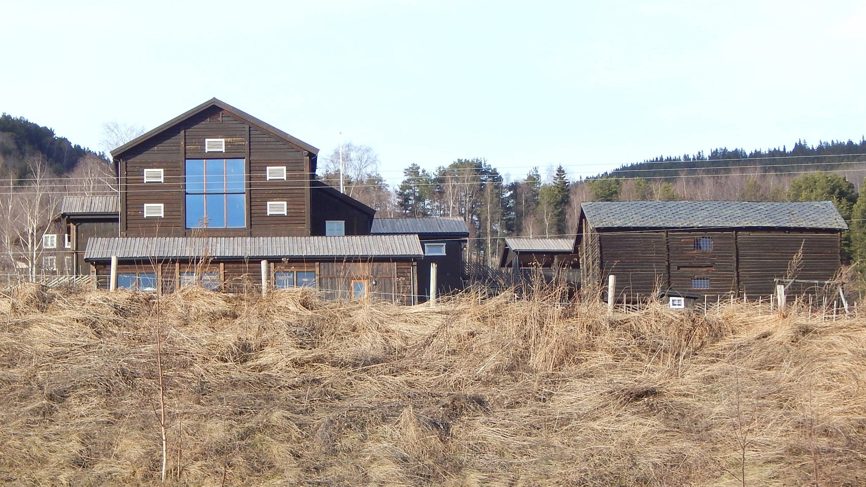 Nedre Rudi (Rudi Gard) i Sør-Fron